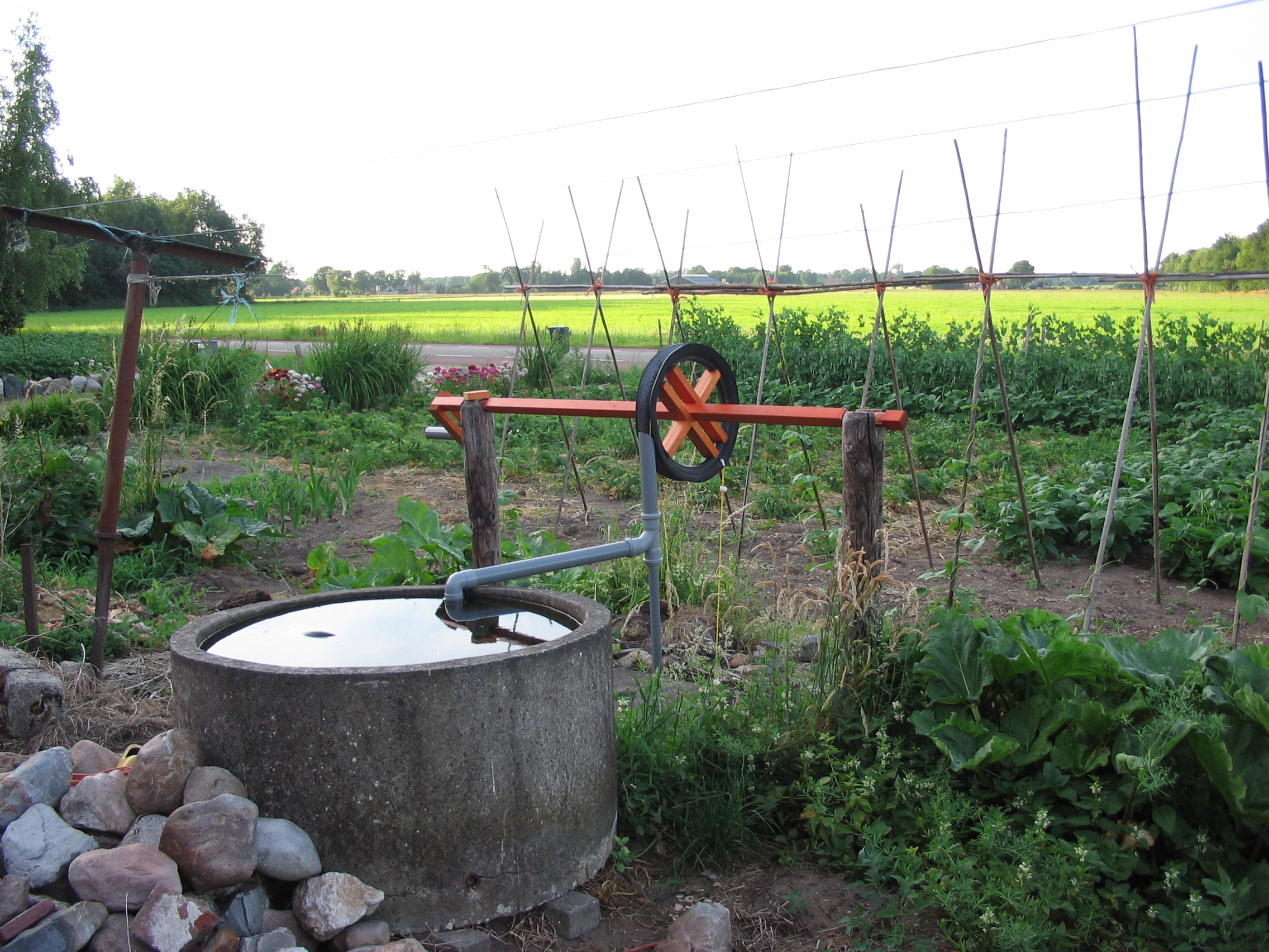 Touwpomp in een groentetuin in Vragender, Achterhoek, NL. [foto R.Schuirink]